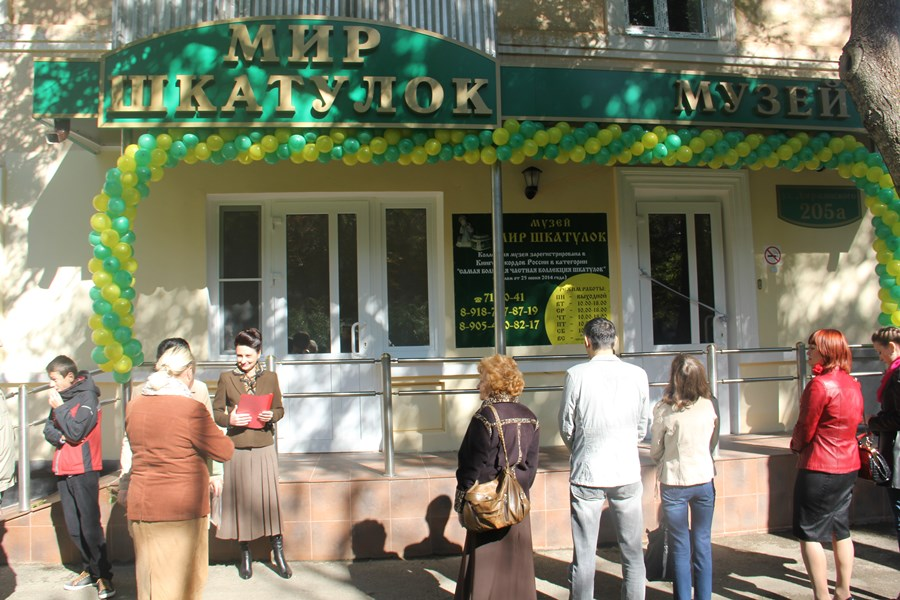 Открытие музея